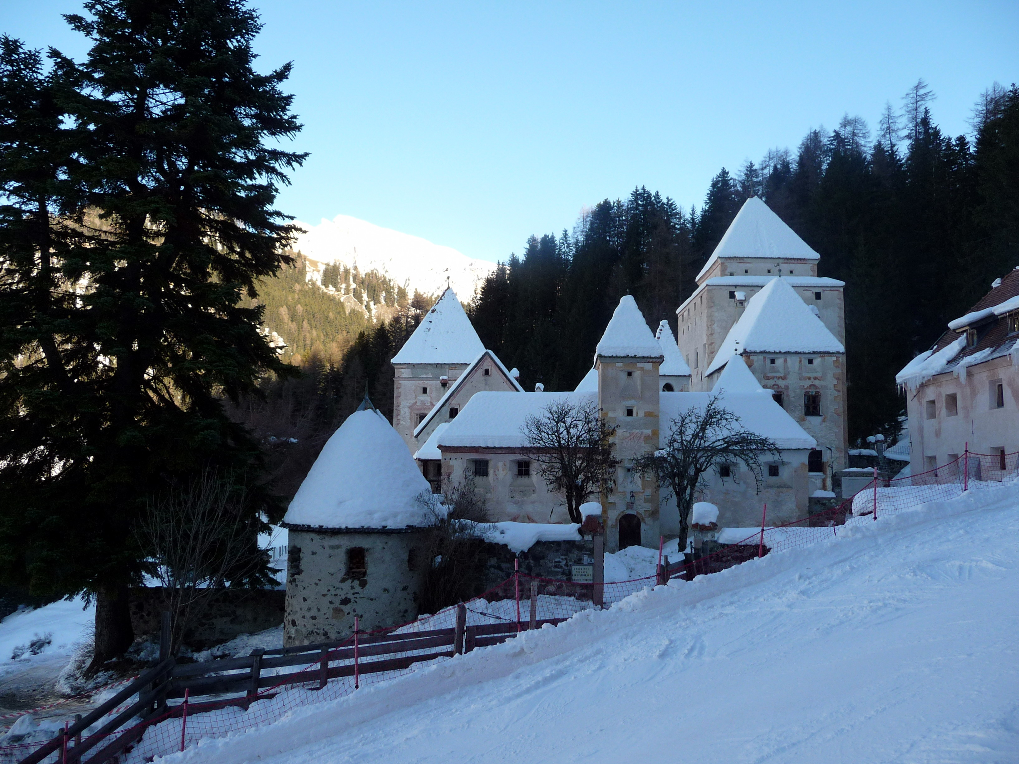 Nei pressi di S.Cristina in Val Gardena il Castel Gardena o Fischburg.